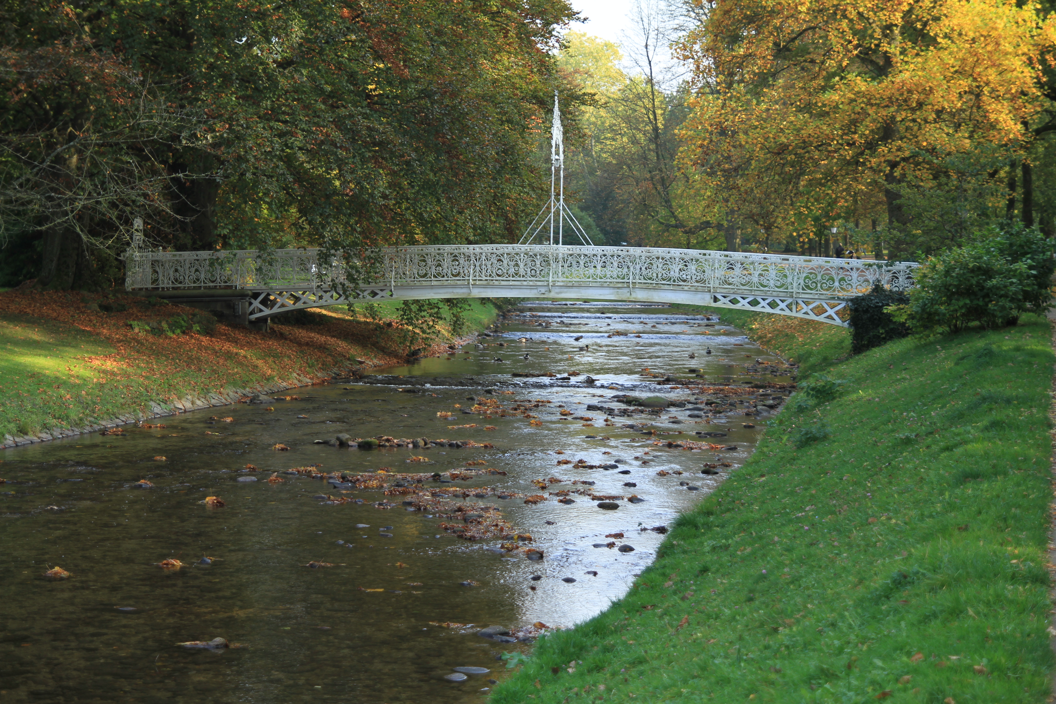 Die Baden-Badener Bellevue-Brücke über die Oos.